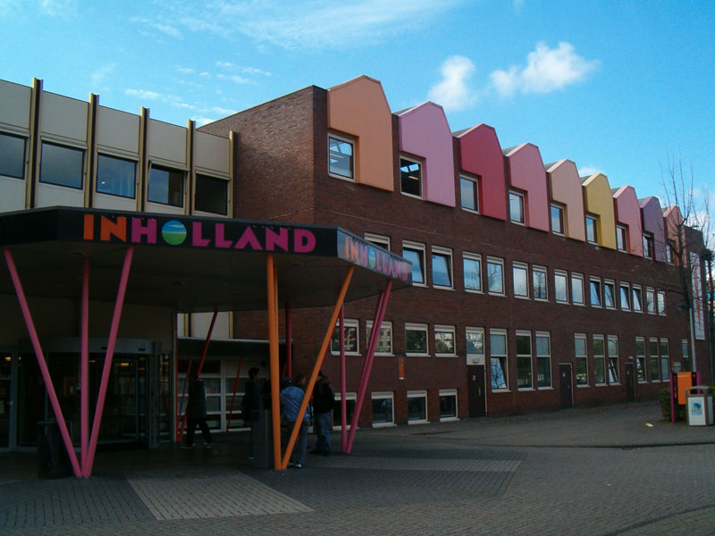 Hogeschool INHOLLAND Amsterdam/Diemen Locatie Wildenborch